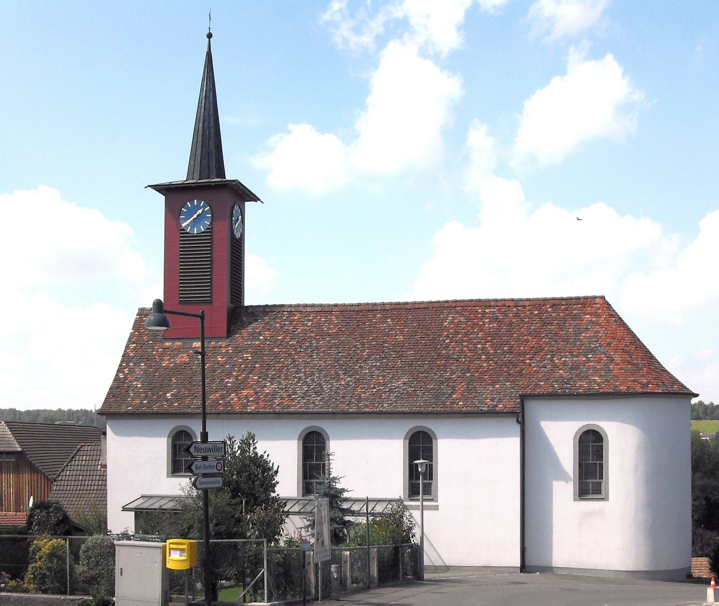 Kirche St. Johannes der Täufer in Schönenbuch, Kanton Basel-Landschaft, Schweiz